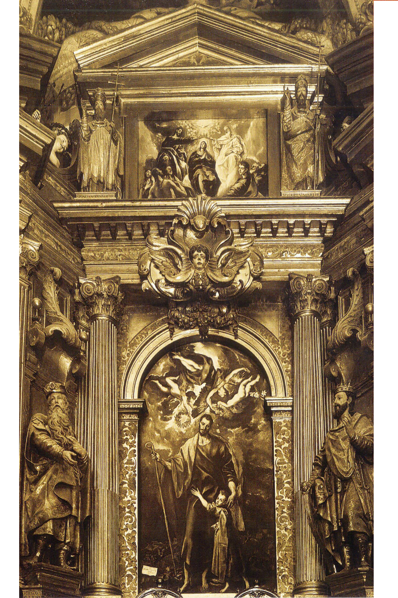 Vista de la parte central de este Retablo, obra de El Greco.